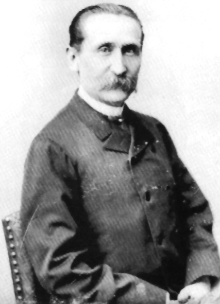 José Granda Esquivel (1835-1911), ingeniero, matemático y catedrático peruano. Ministro de Estado y Director de la Escuela Nacional de Ingenieros.